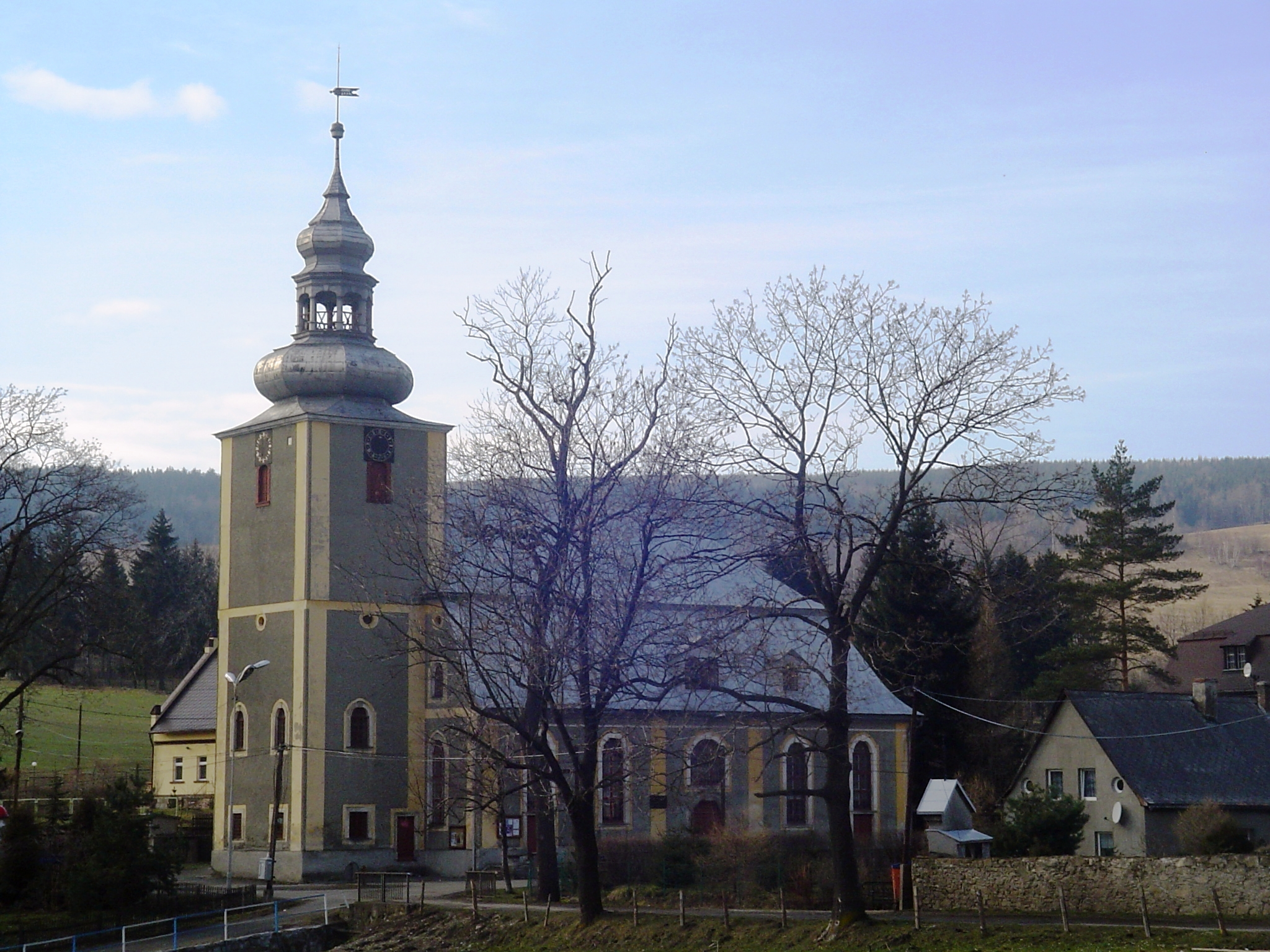 kościół ewangelicki, ob. rzym.-kat. par. p.w. św. Bartłomieja Apostoła, 2 poł. XVIII Leszczyniec, Kamienna Góra